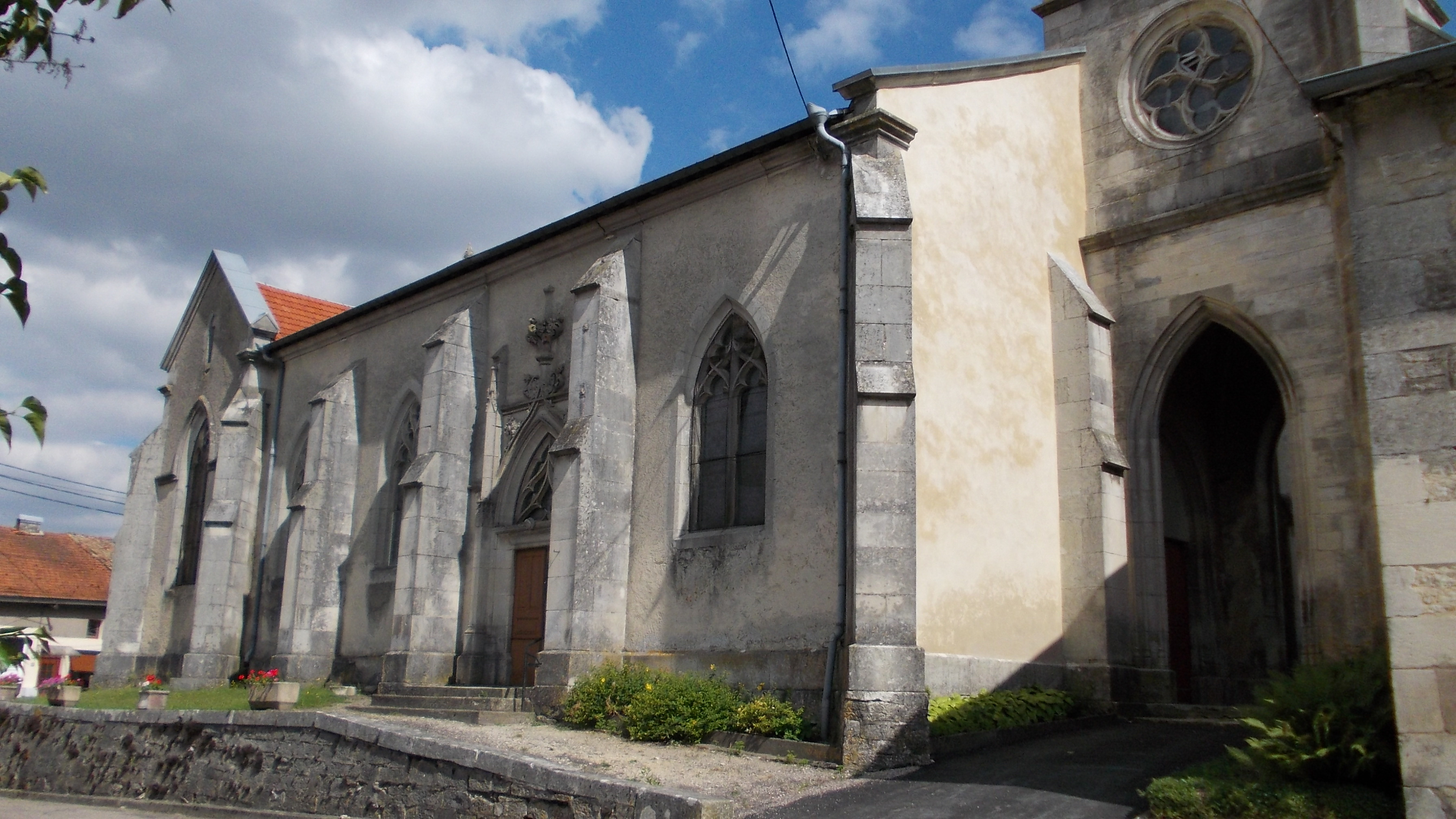 Église de la commune Saint-Joire